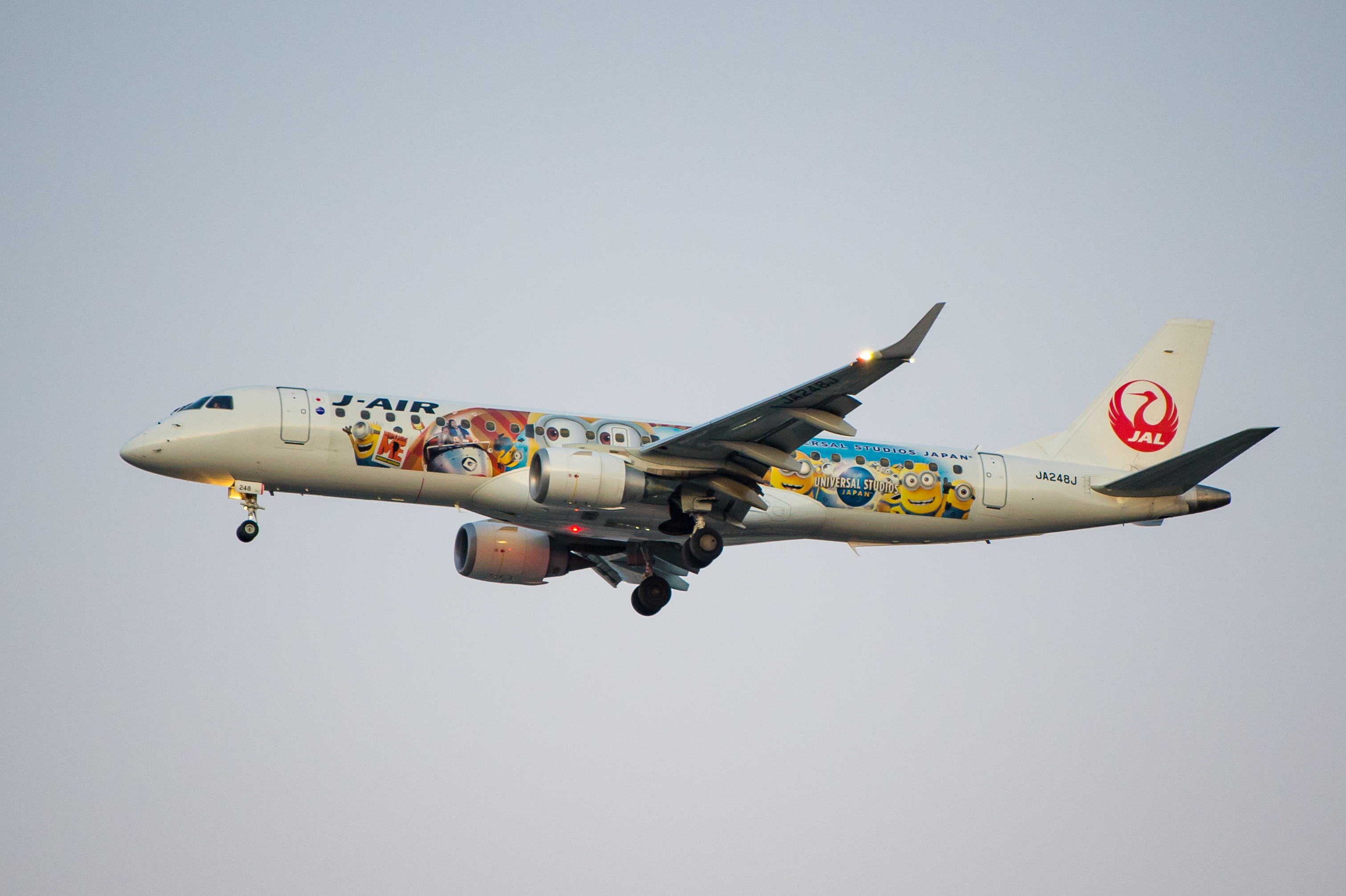 J-Air Embraer ERJ-190